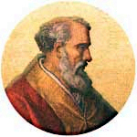 Papa Giovanni XIII (Giovanni dei Crescenzi)